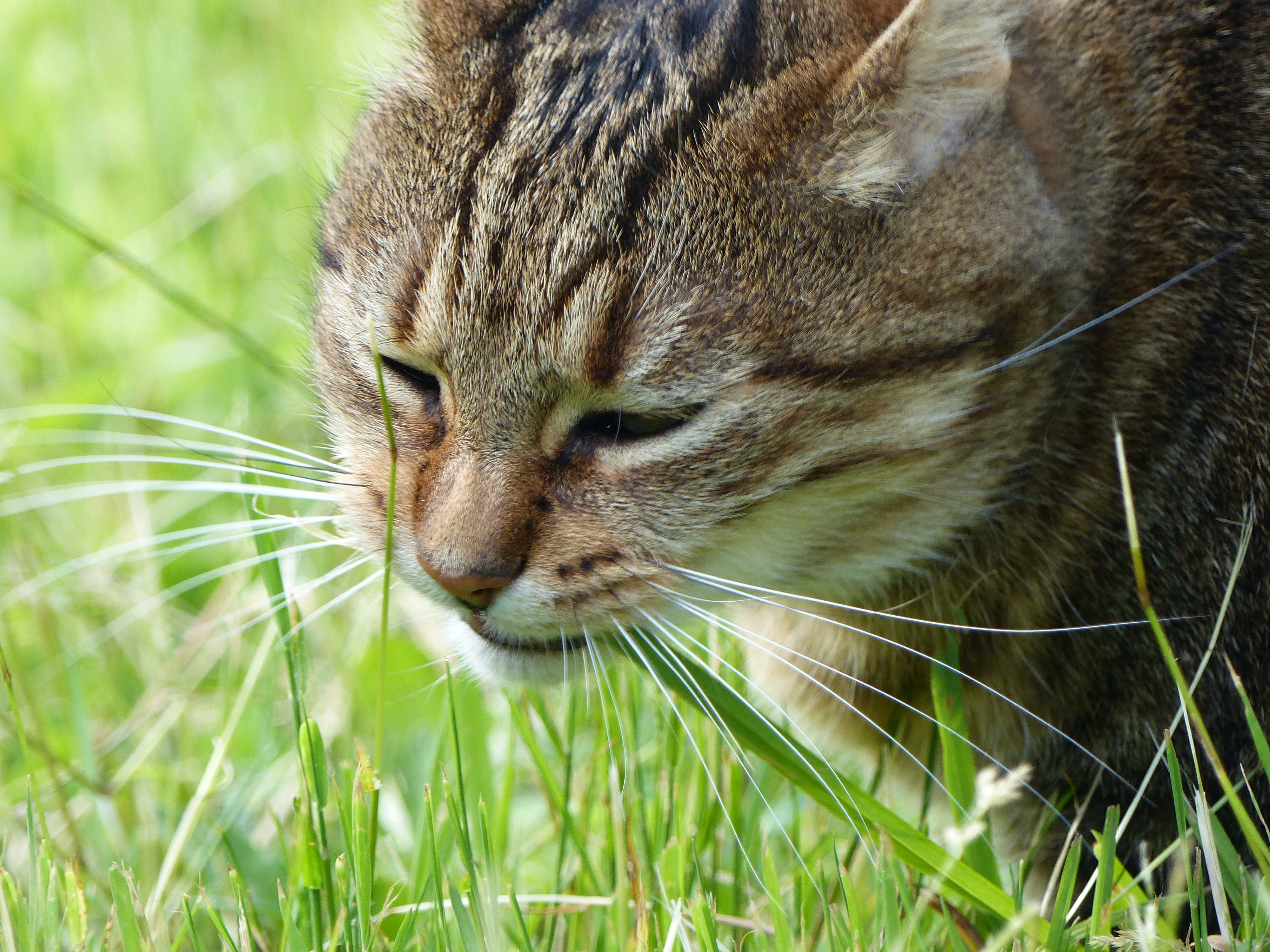 Chatte européenne brown tabby de 11 ans.